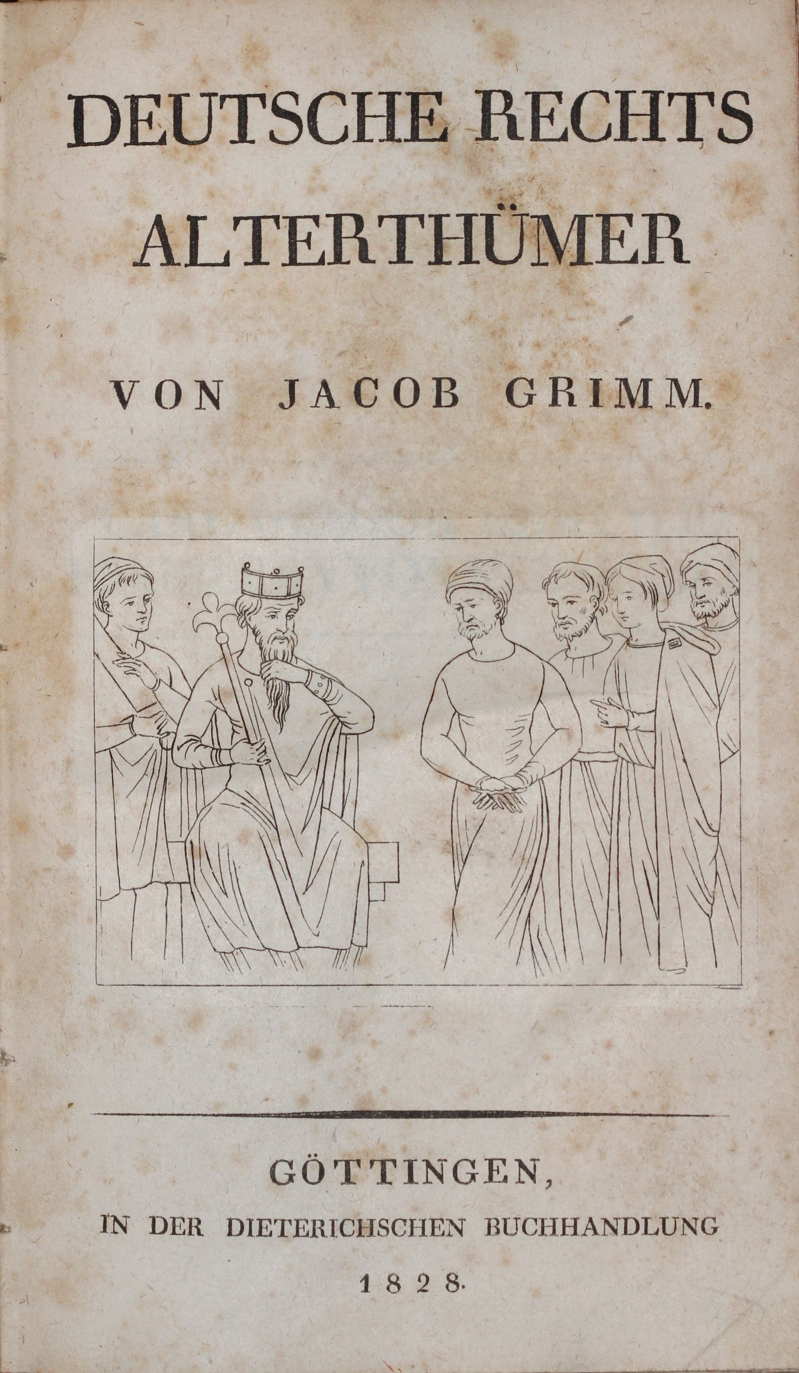 Titelblatt von: Jacob Grimm: Deutsche Rechtsalterthümer. Göttingen 1828